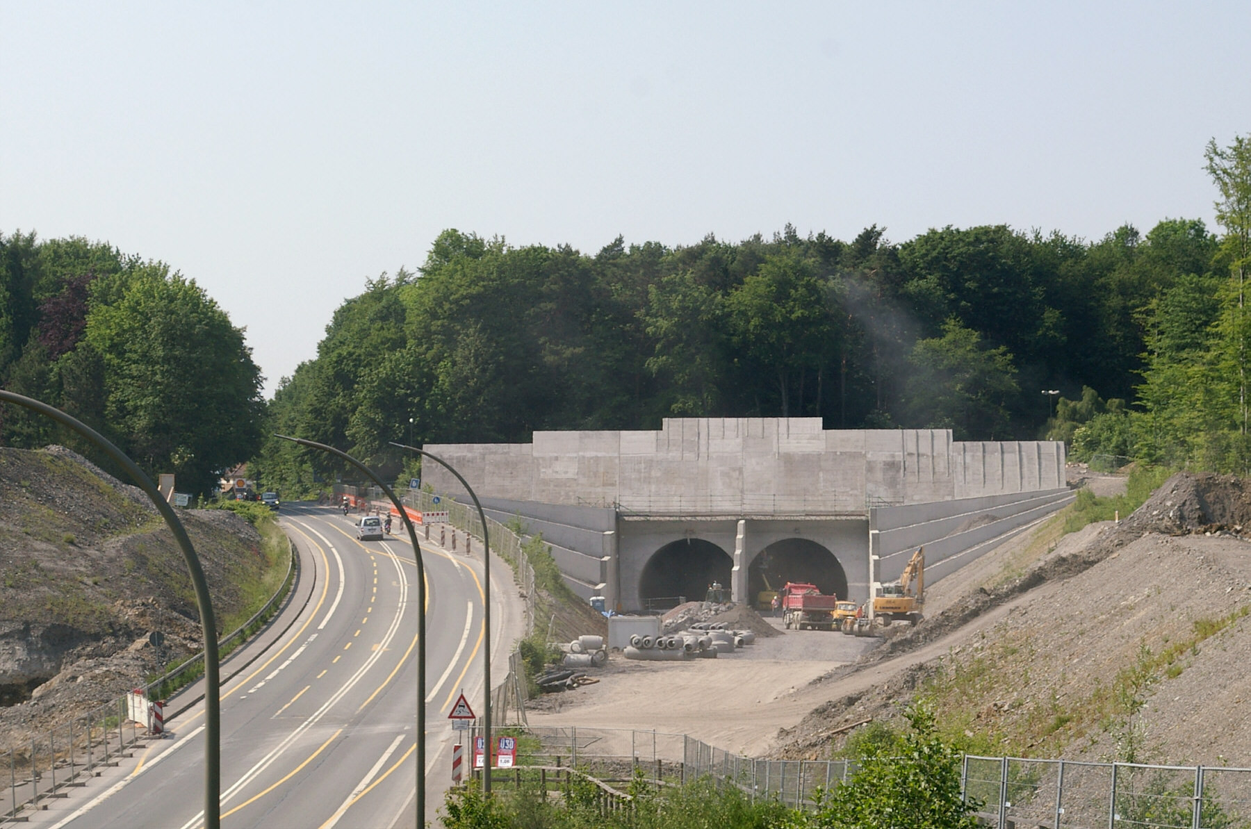 Baustelle des Tunnels Berghofen, Südportal.